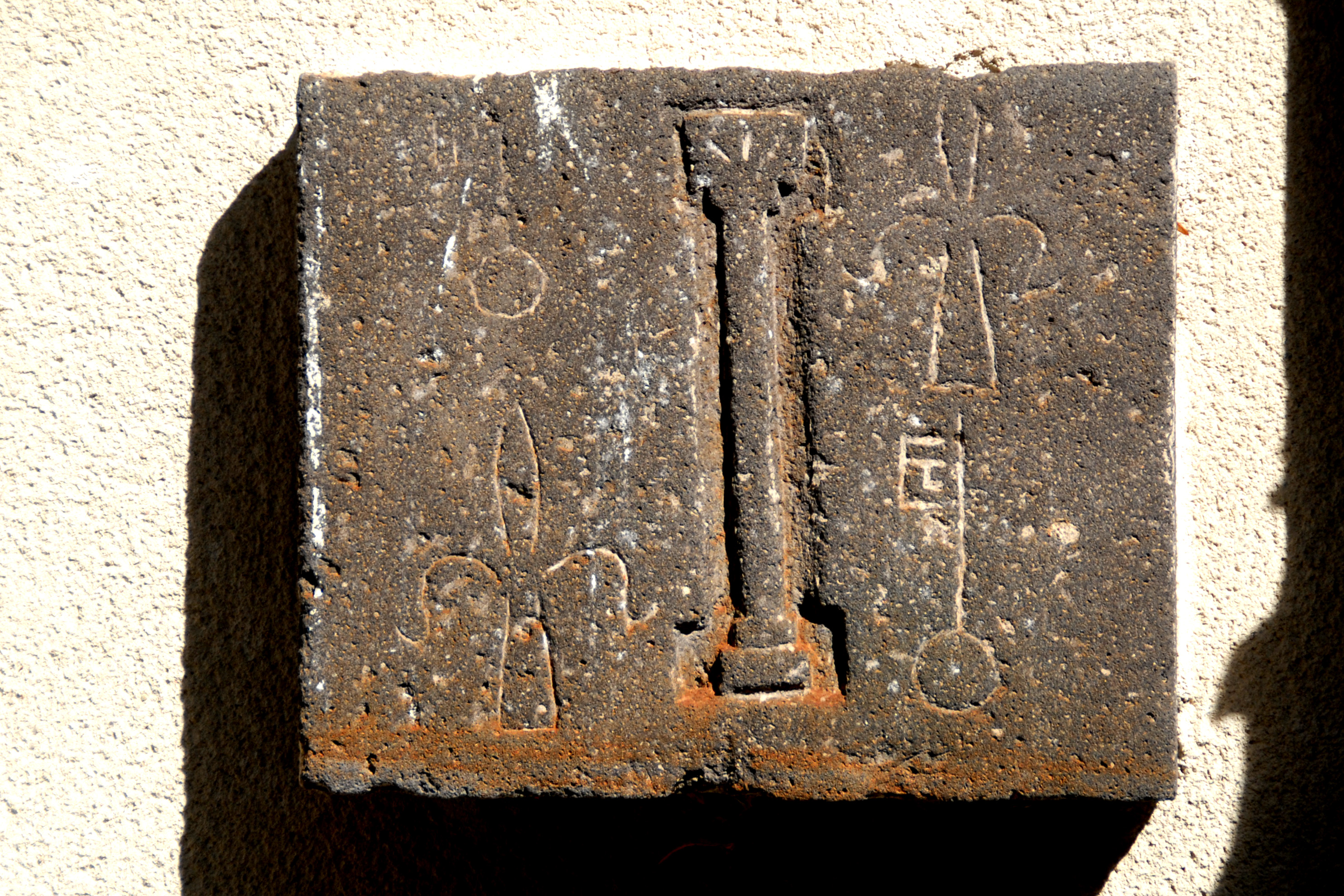 Mozat, Tableau, in Nische Joch 1